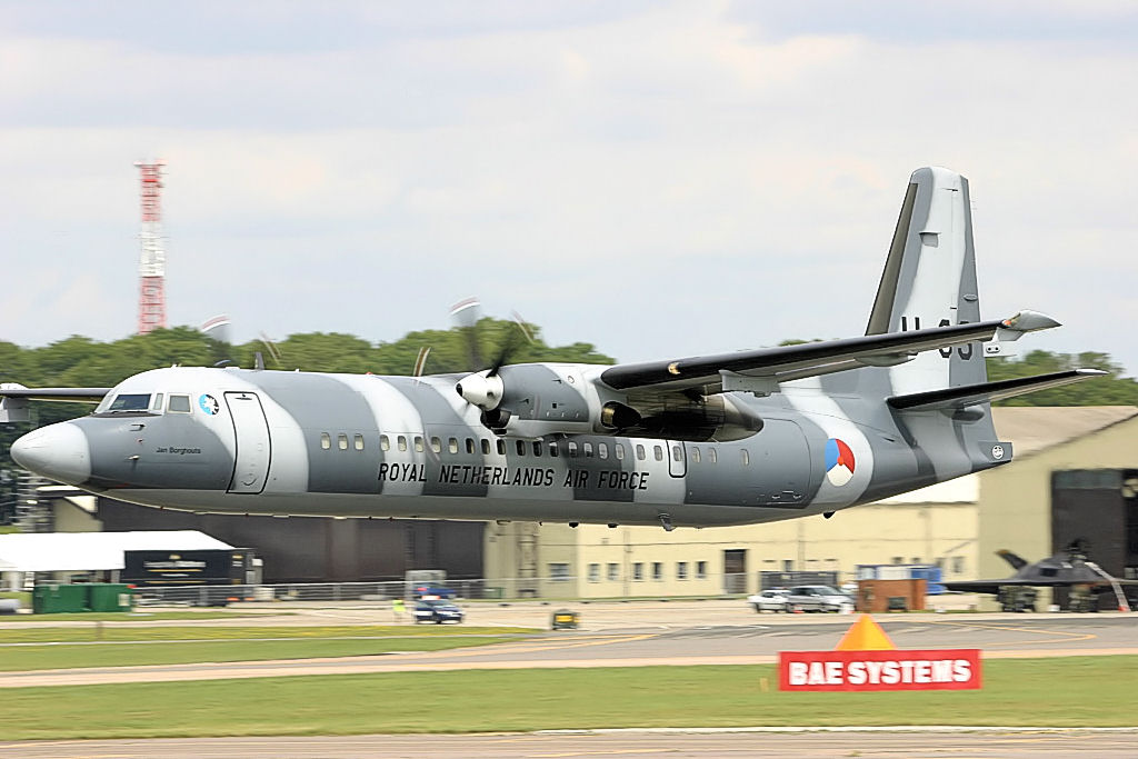 Fokker 60 - RIAT 2004